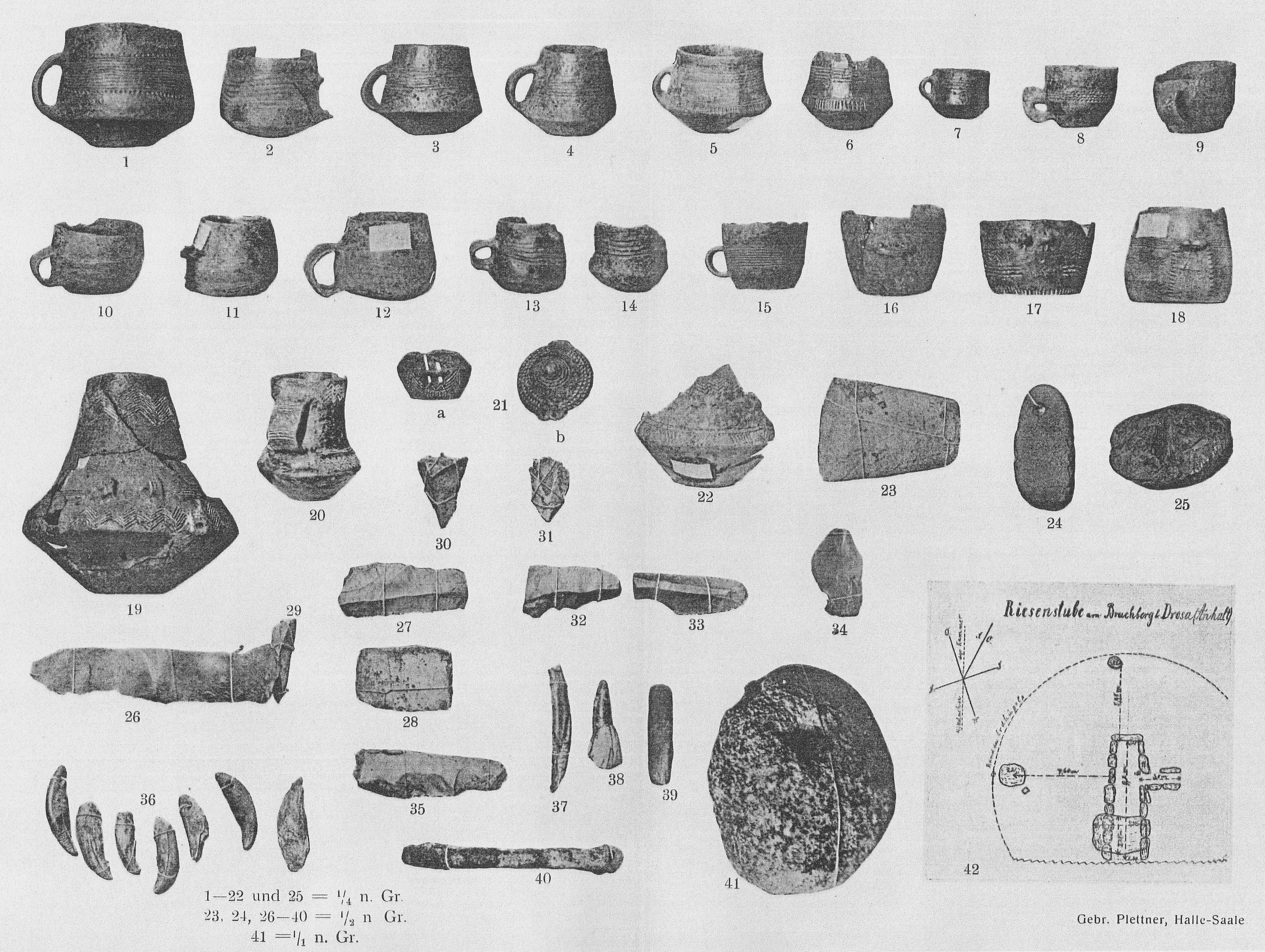 Funde aus dem Großsteingrab Drosa